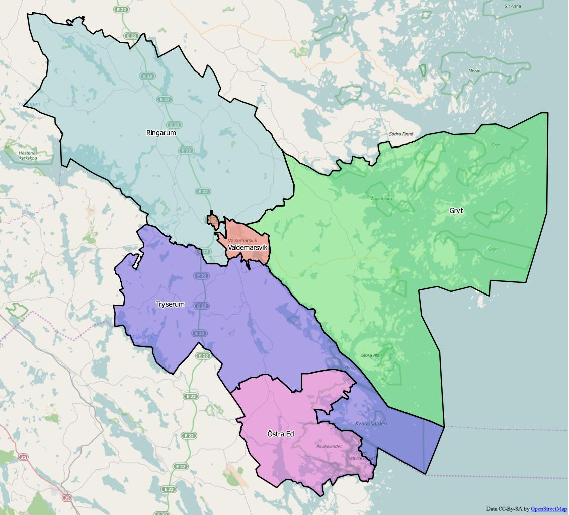 Distriktsindelningen i Valdemarsviks kommun World file: 90.03740335846154608 0 0 -90.03740335846154608 1804874.65828892961144447 8052937.69852703716605902